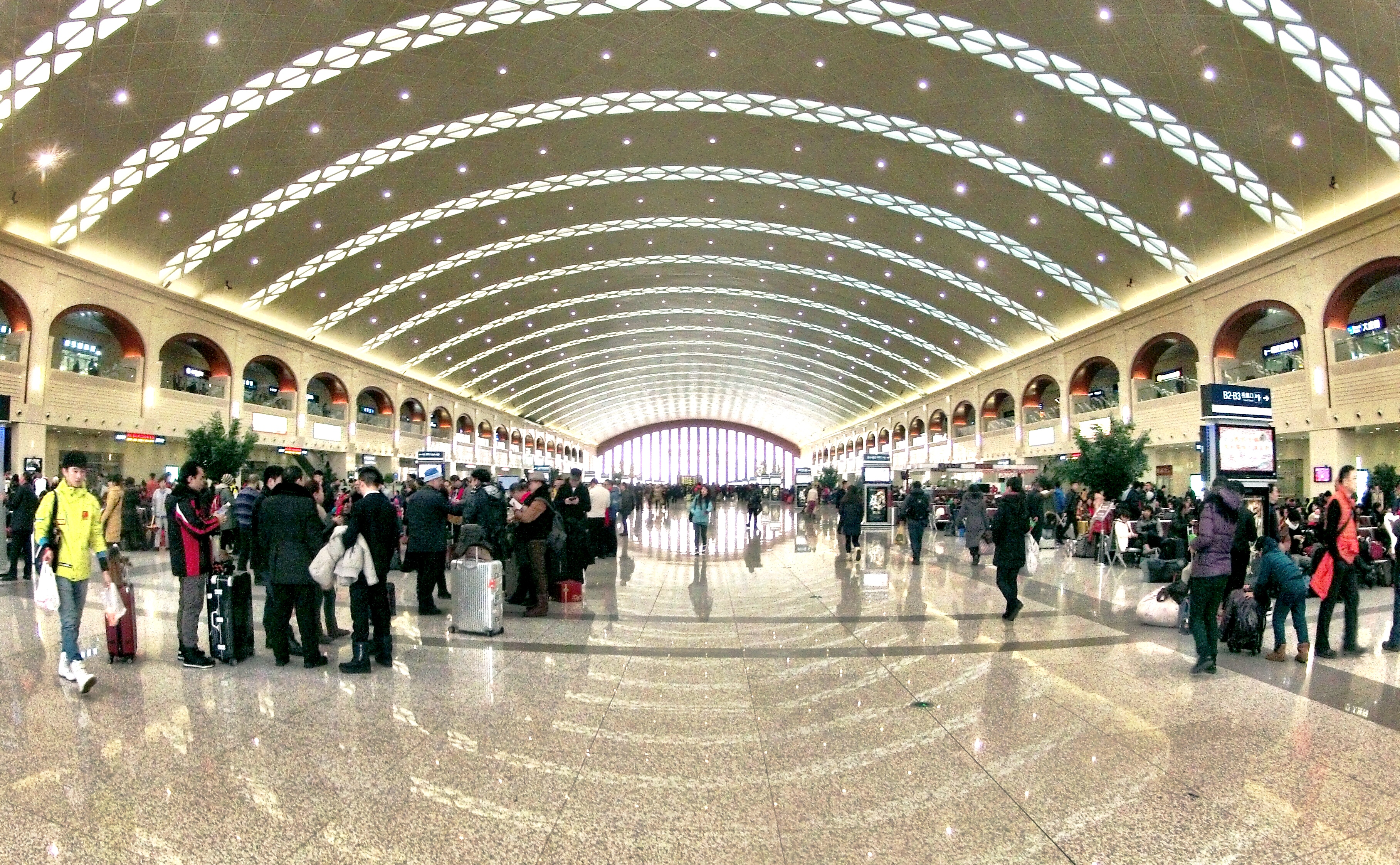 Feb 2014. Harbin, China.